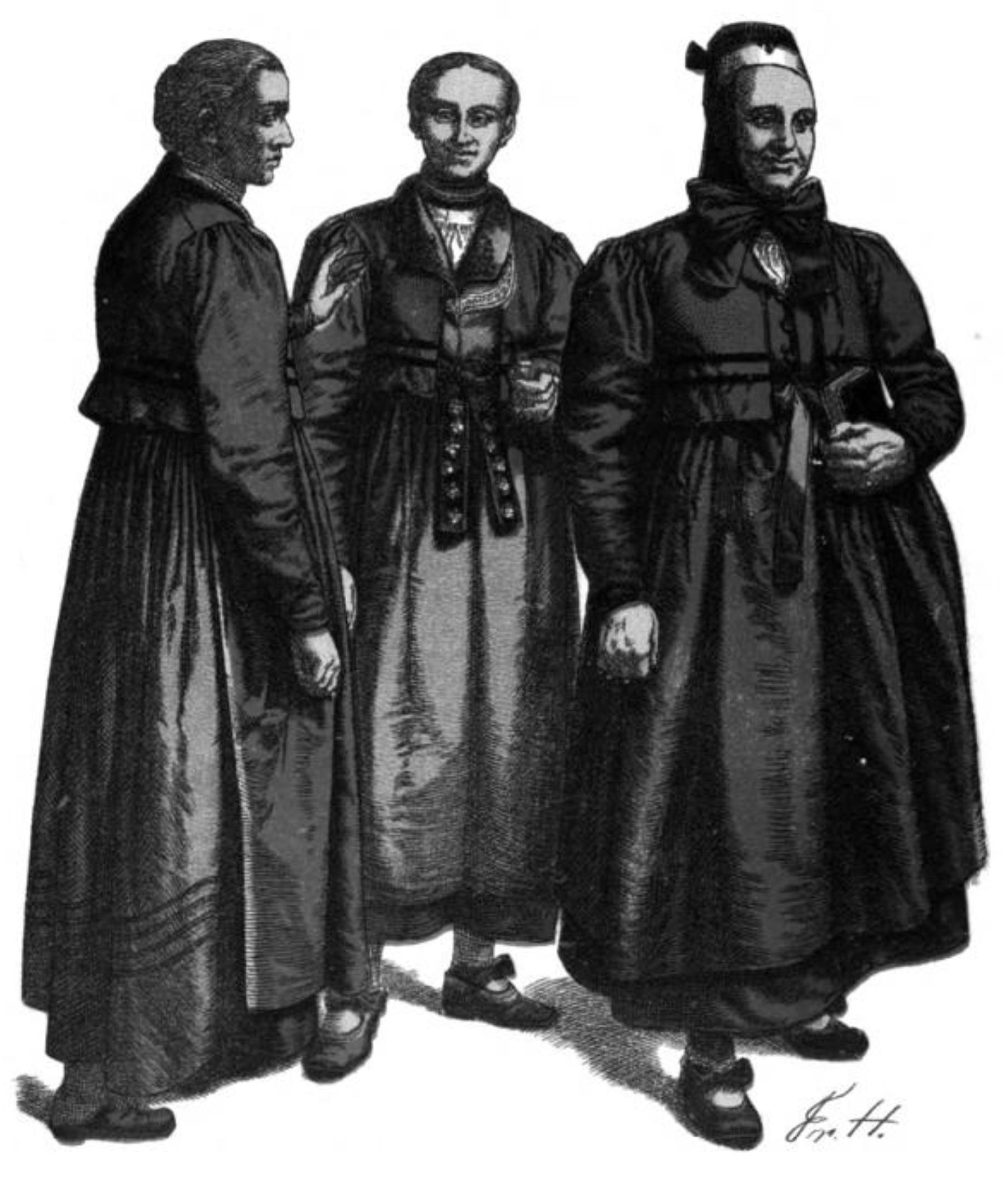 Friedrich Hottenroth: Nassauisches Trachtenbuch Tafel 12: Bäuerinnen aus der östlichen Dillgegend (Eibach) um 1880